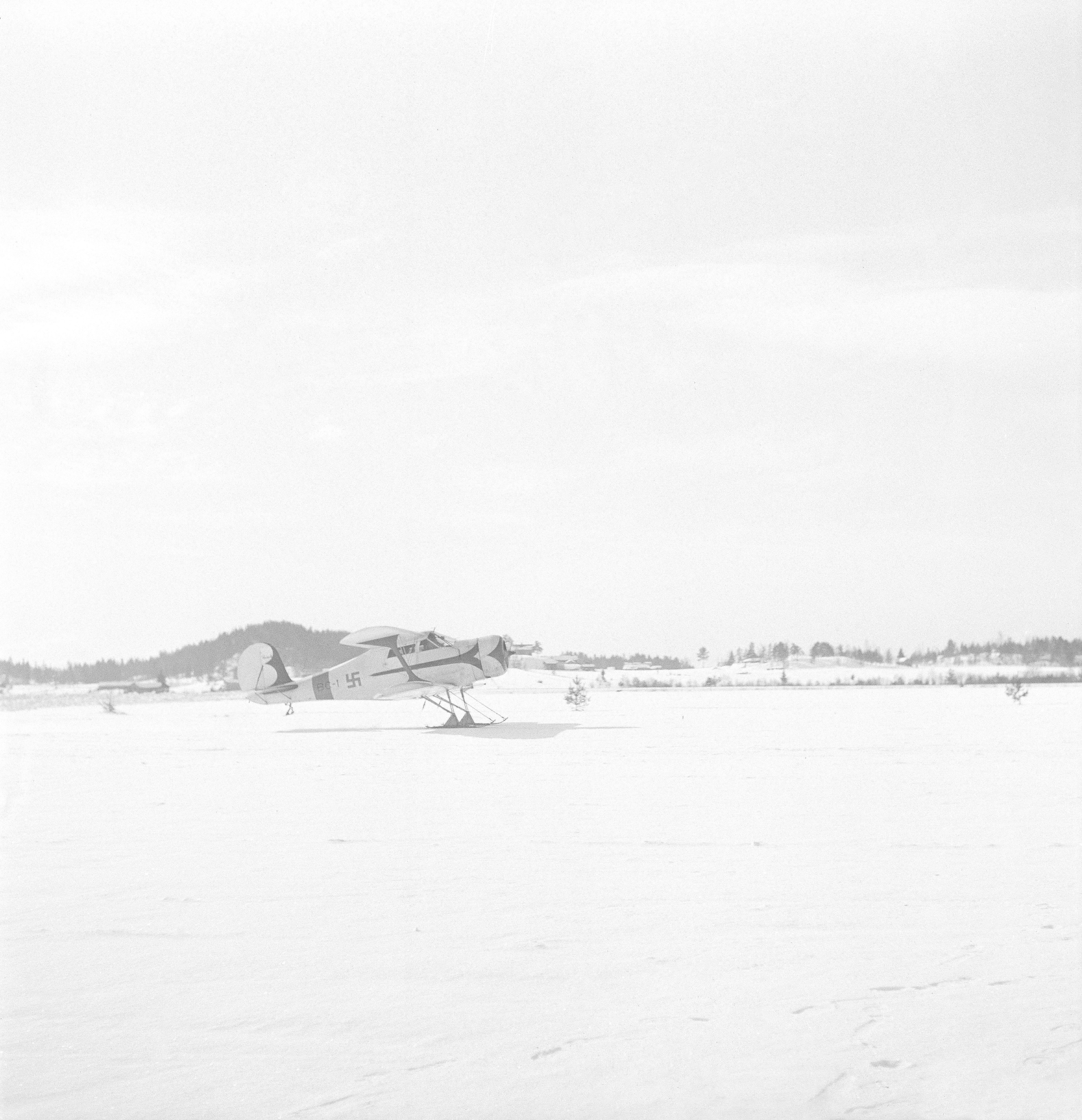 Kenttäpiispaa kuljettanut kone juuri nousussa. (Kuvassa on Beechcraft C17L). Kuvauspaikka: Mikkeli